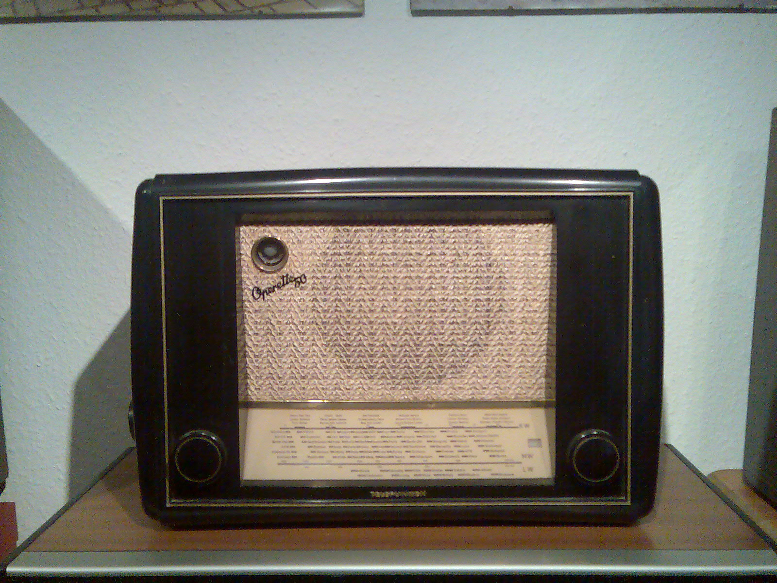 Früher Nachkriegsempfänger Operette 50, 1950